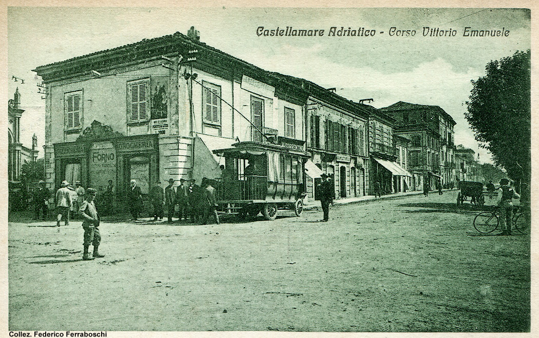 Cartolina di corso Vittorio Emanuele a Castellammare Adriatico (oggi Pescara). Si noti il filobus.